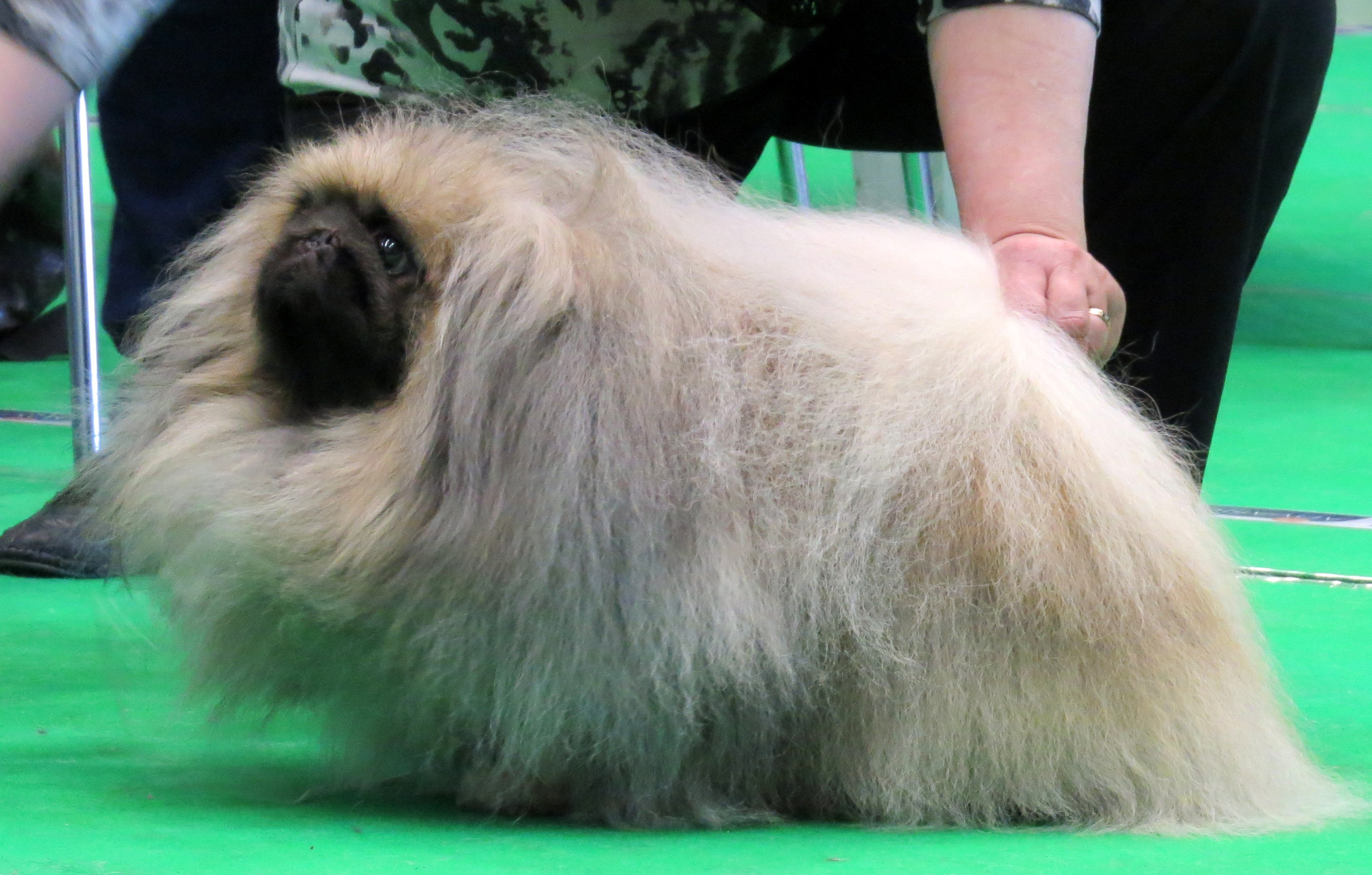 Пекинес